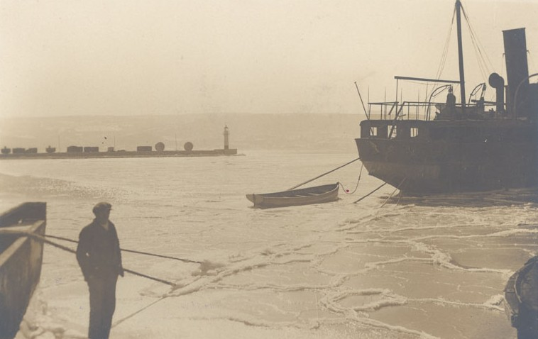 Замръзнало море при Варна. Кораби и лодки в пристанището. В дъното - пристанищният фар.